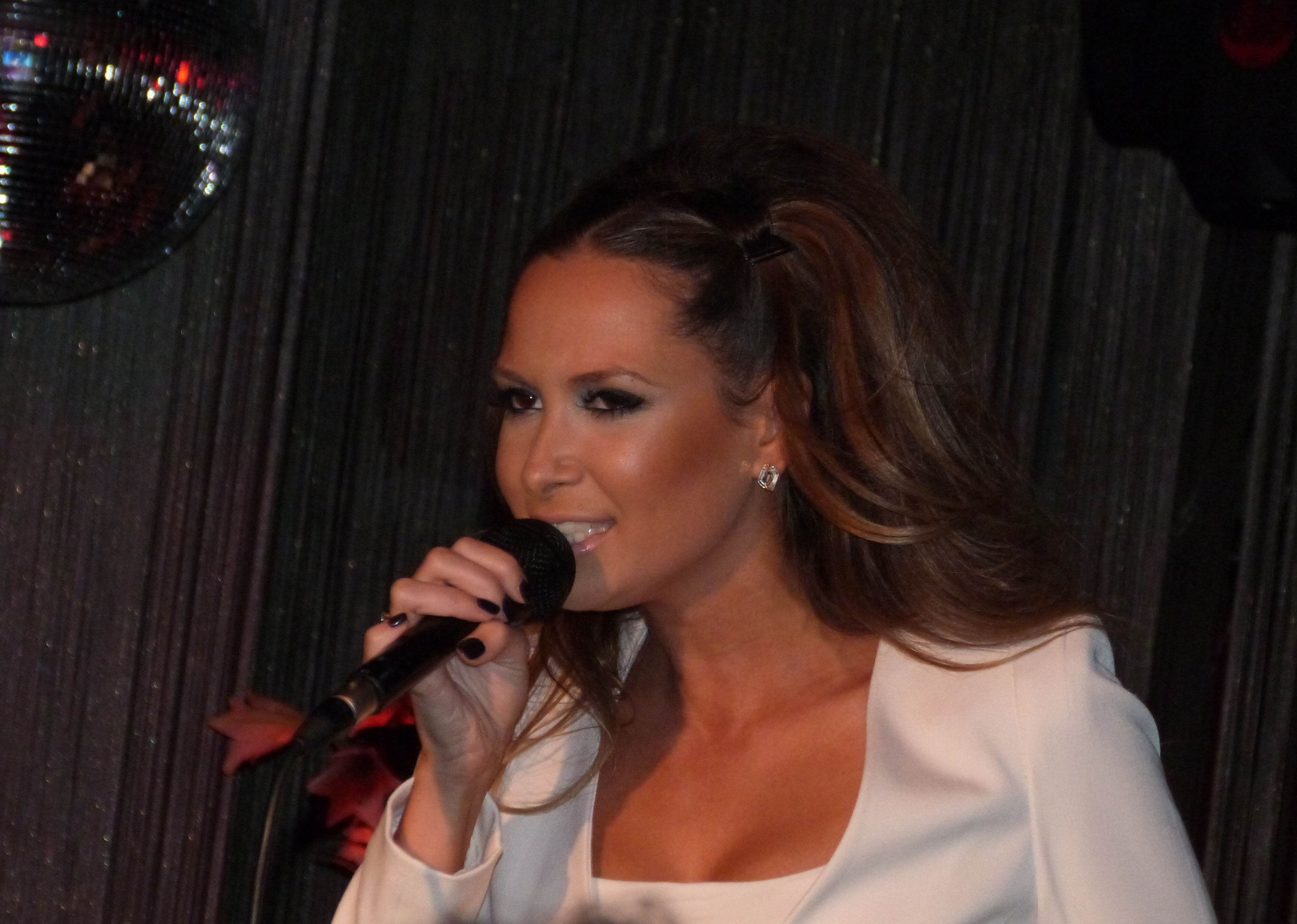 Mandy in Hamburg, Stageclub am 23.09.2012